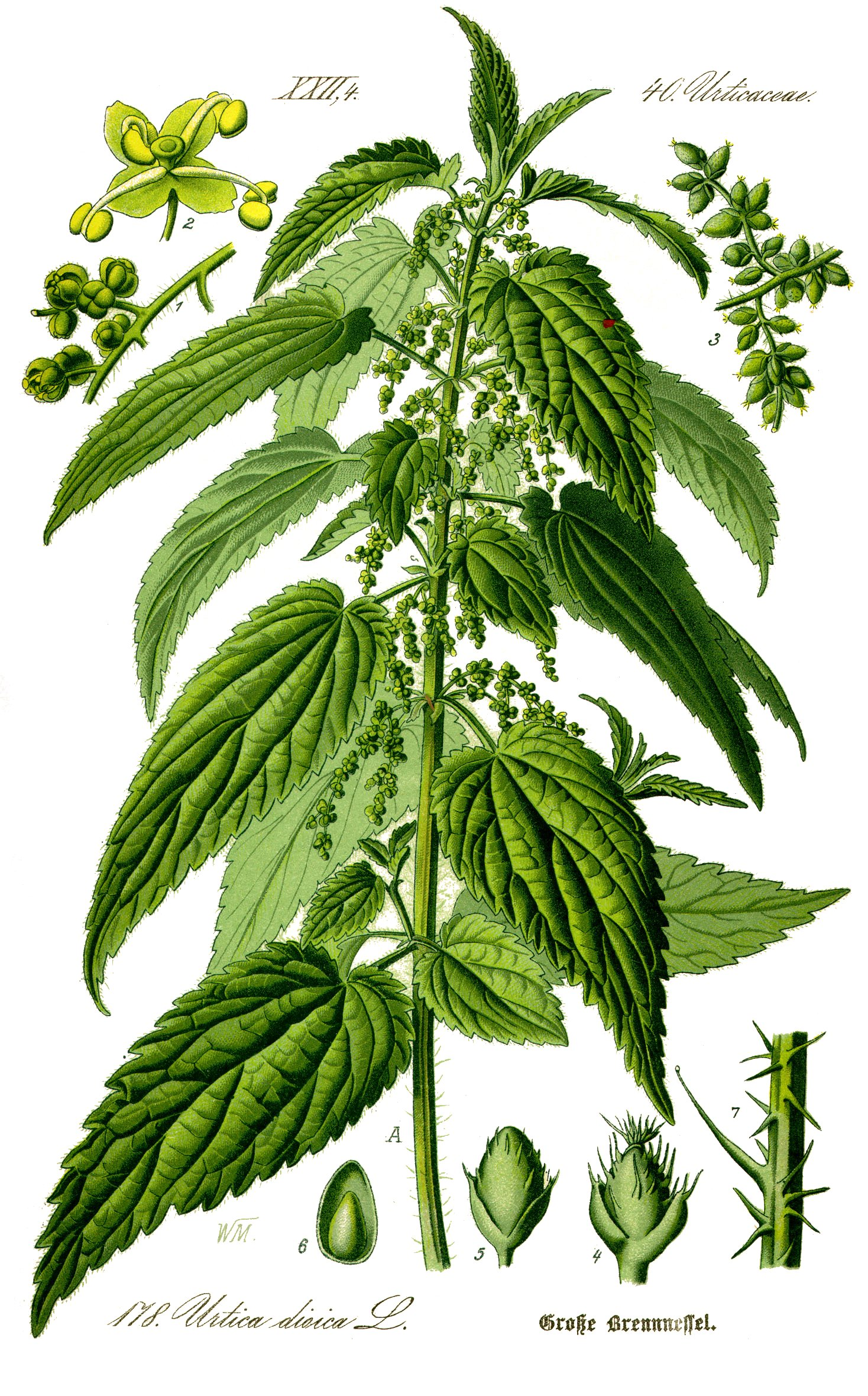 Name Urtica dioica Family Urticaceae